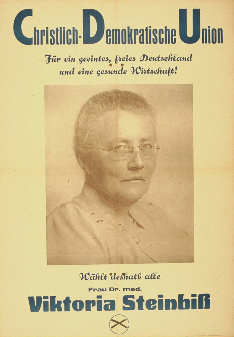 Für ein geeintes, freies Deutschland und eine gesunde Wirtschaft! Wählt deshalb alle Frau Dr. med Viktoria Steinbiß Abbildung:PorträtfotoPlakatart:Kandidaten-/Personenplakat mit PorträtDrucker_Druckart_Druckort:Deutscher Heimat-Verlag Ernst Gieseking, BielefeldObjekt-Signatur:10-001: 112Bestand:Plakate zu Bundestagswahlen (10-001)GliederungBestand10-18:Plakate zu Bundestagswahlen (10-001) » Die 1. Bundestagswahl am 14. August 1949 » CDU » Mit PorträtfotoLizenz:KAS/ACDP 10-001: 112 CC-BY-SA 3.0 DE